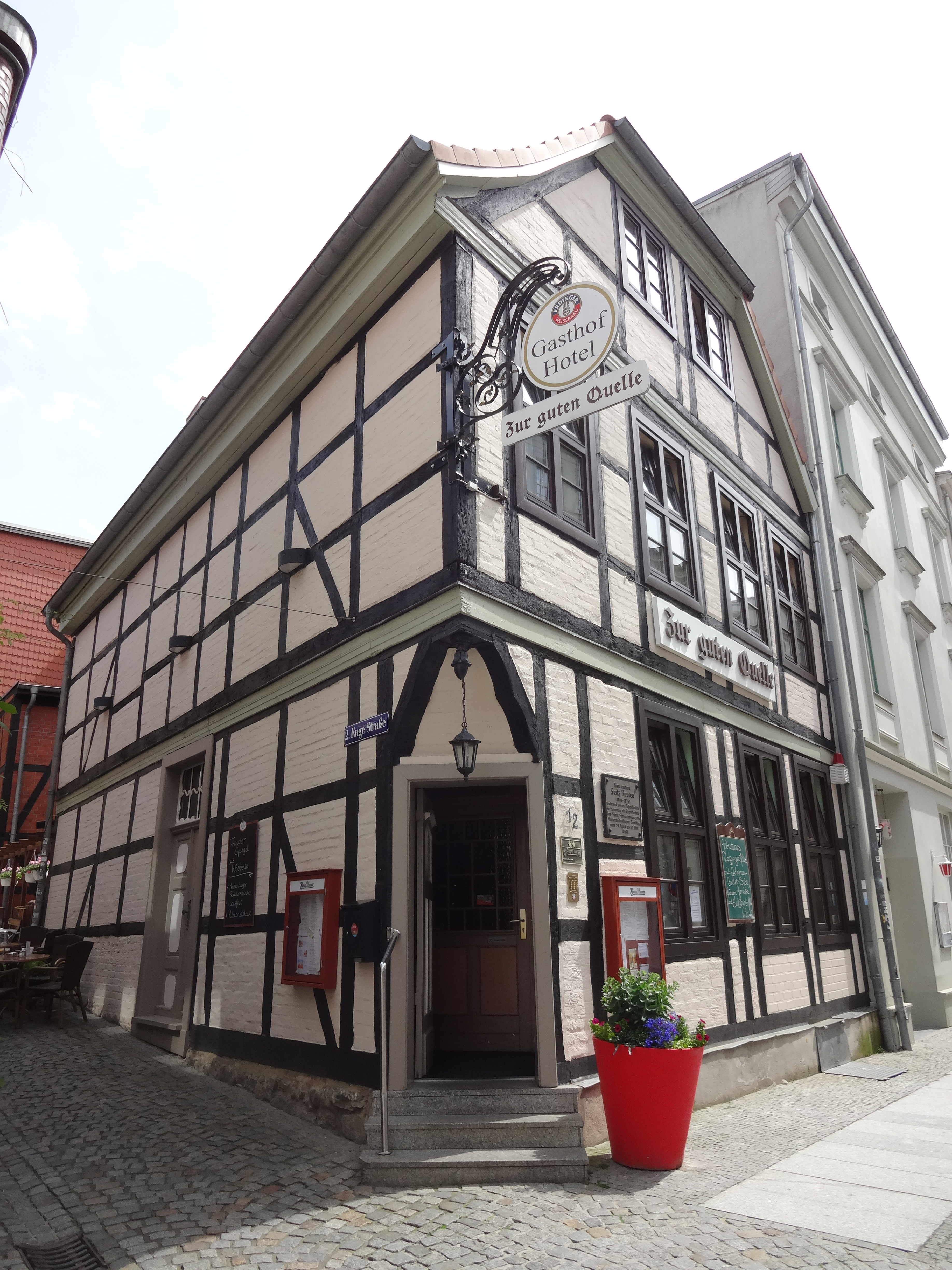 Denkmalgeschütztes ehemaliges Wohnhaus (Gaststätte) mit Gedenktafel für Fritz Reuter in der Schusterstraße 12 in Schwerin